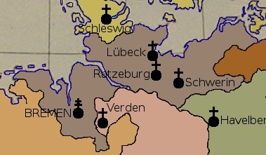 Die alte Kirchenprovinz (Hamburg-)Bremen